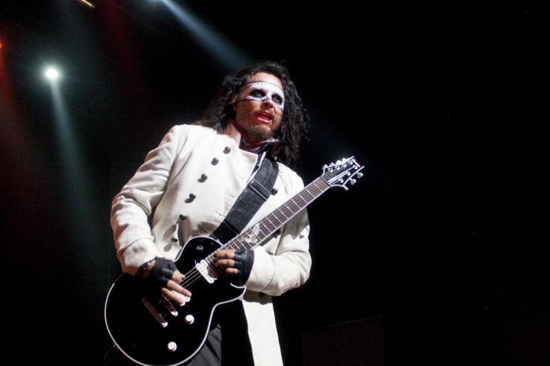 Korn Live @ Credicard Hall - 21/04/2010 - São Paulo, Brasil É proibida a cópia ou reprodução deste material sem a autorização do autor. Por favor, não publique nada daqui sem o devido crédito. Fotógrafo: Alexandre Cardoso